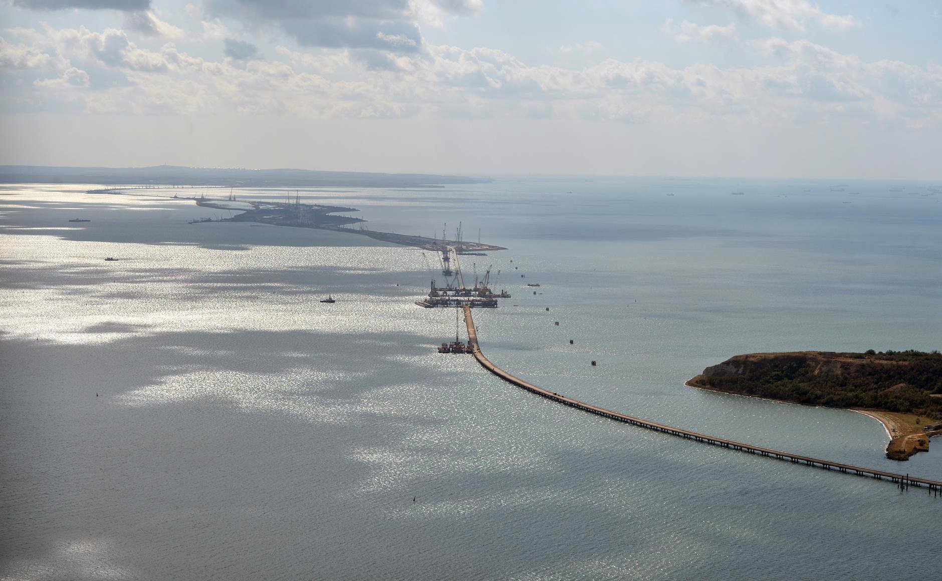 Строительство транспортного перехода через Керченский пролив, 15 сентября 2016.